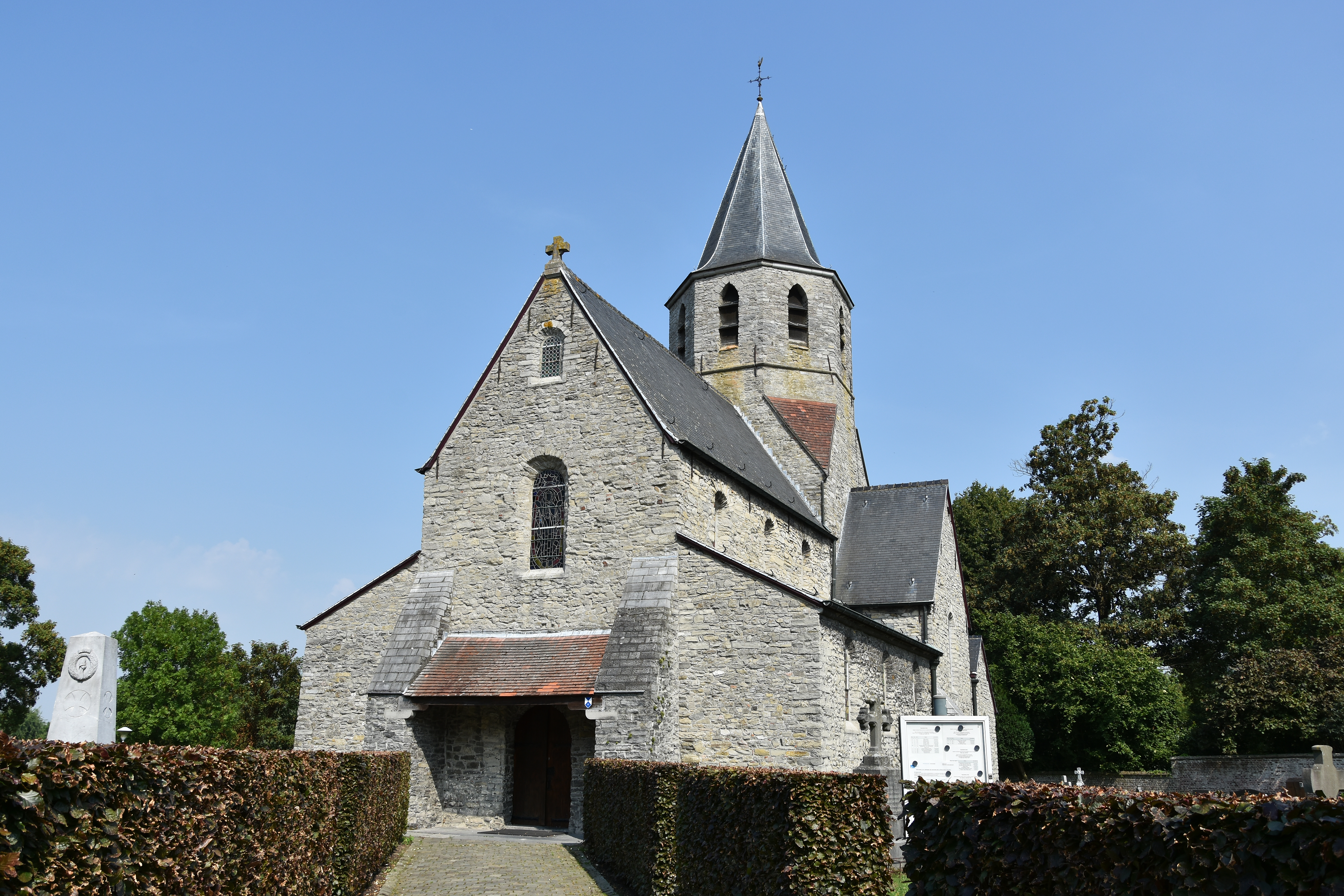 Afsnee - Sint-Jan-de-Doperkerk 18-8-2016 15-41-44